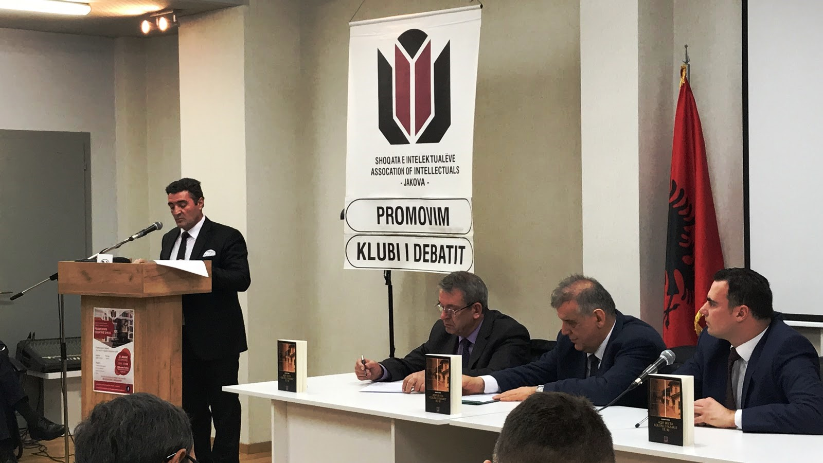 Në Gjakovë promovimi i librit Aqif Blyta : Kolosi i Pazarit të Ri, autorit Ismet Azizi